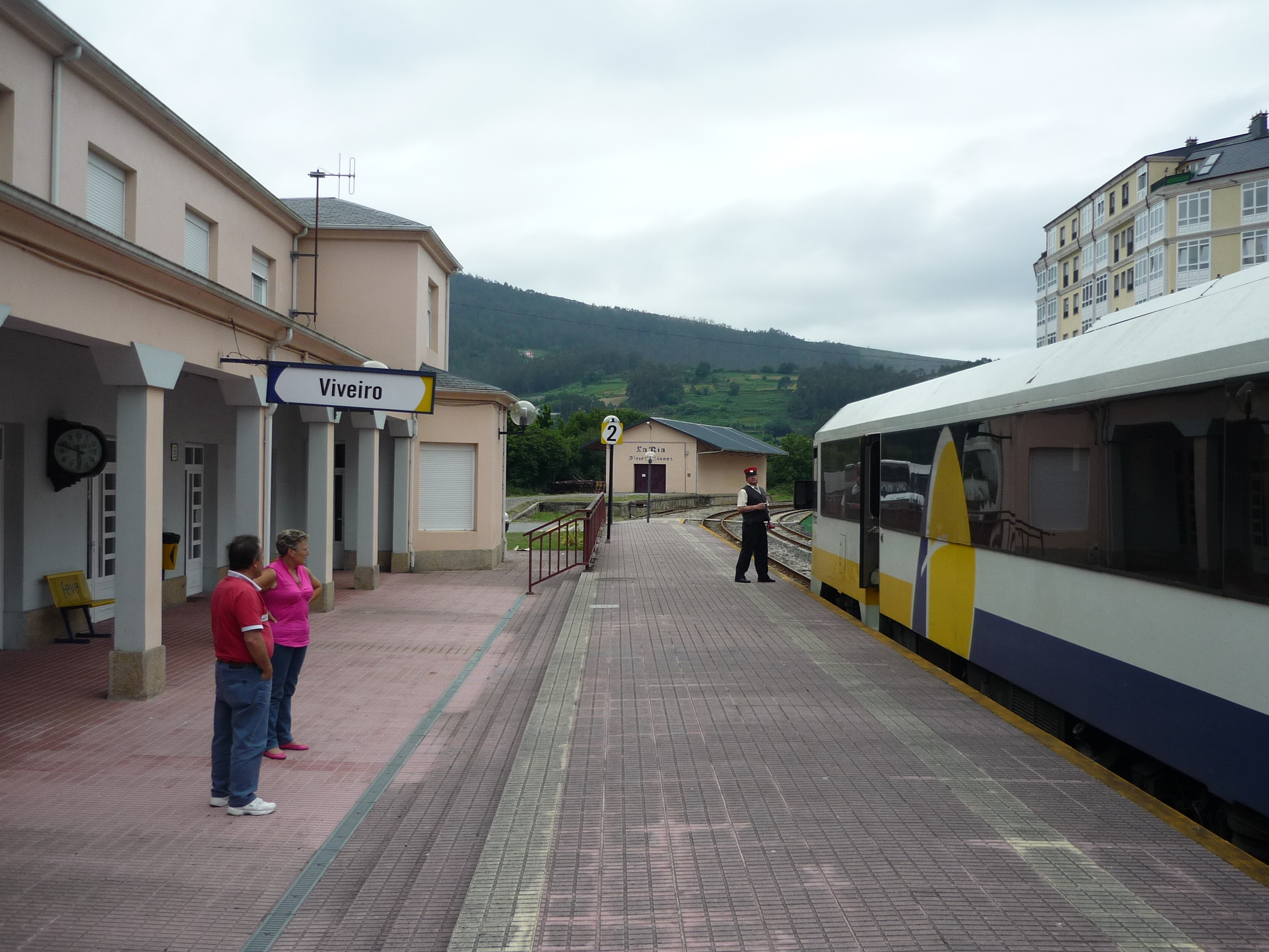 Ferrocarril Español de Vía Estreita Imaxe tomada en Viveiro